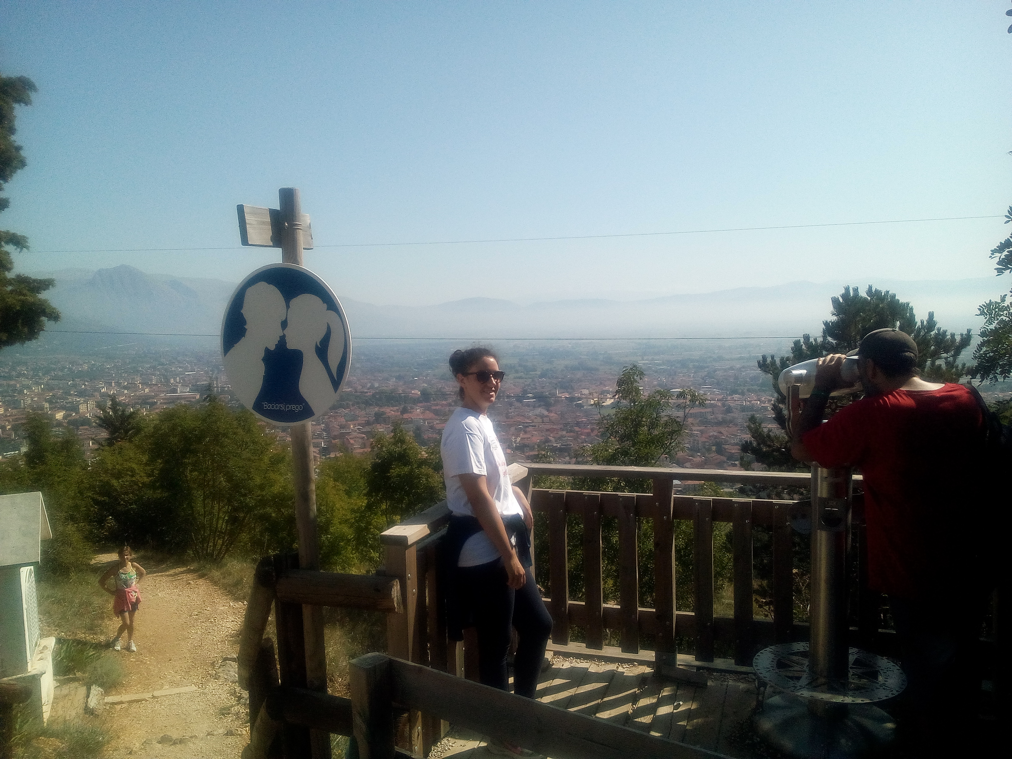 Installazione romantica sul monte Salviano ad Avezzano